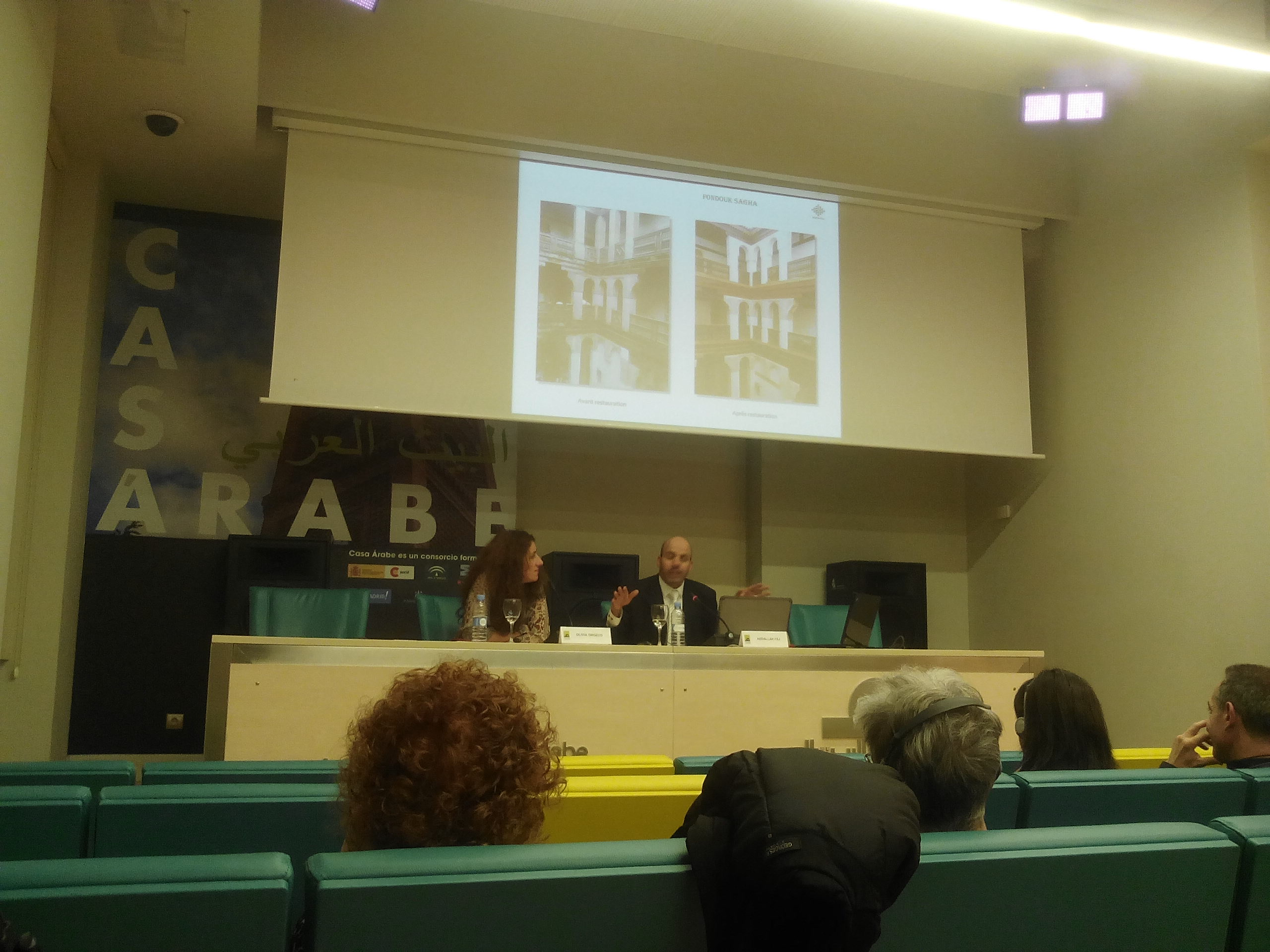 Fez, una capital histórica al norte de Marruecos, ayer